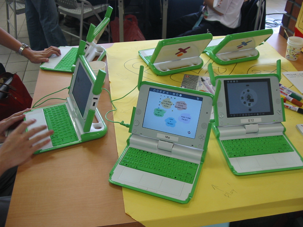 OLPC -- 一孩一部腦